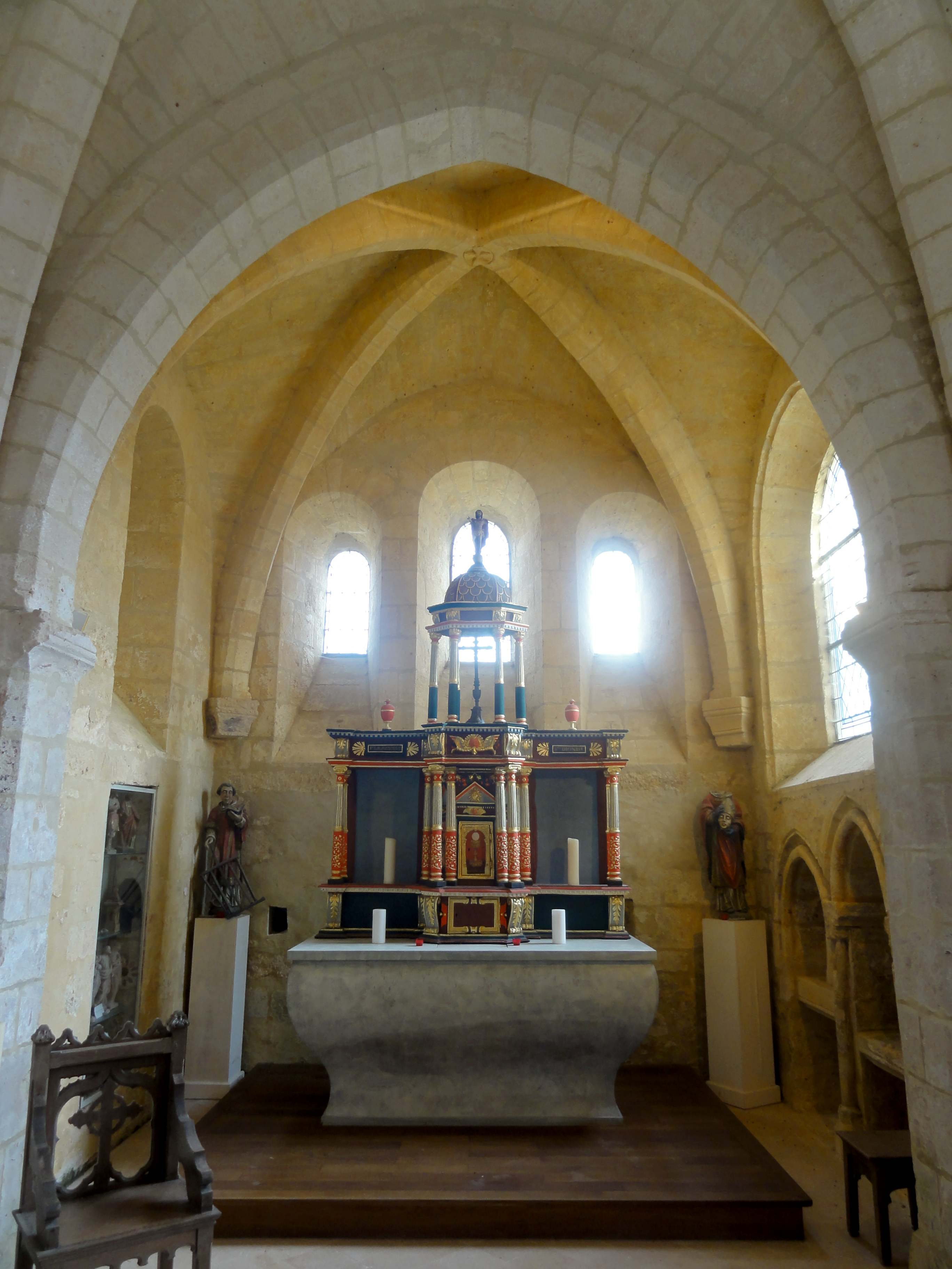 Abside.